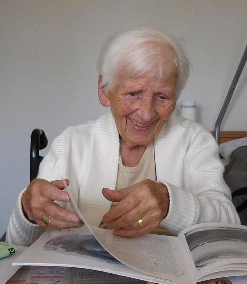 Portait vun der Katharina Szelinski-Singer